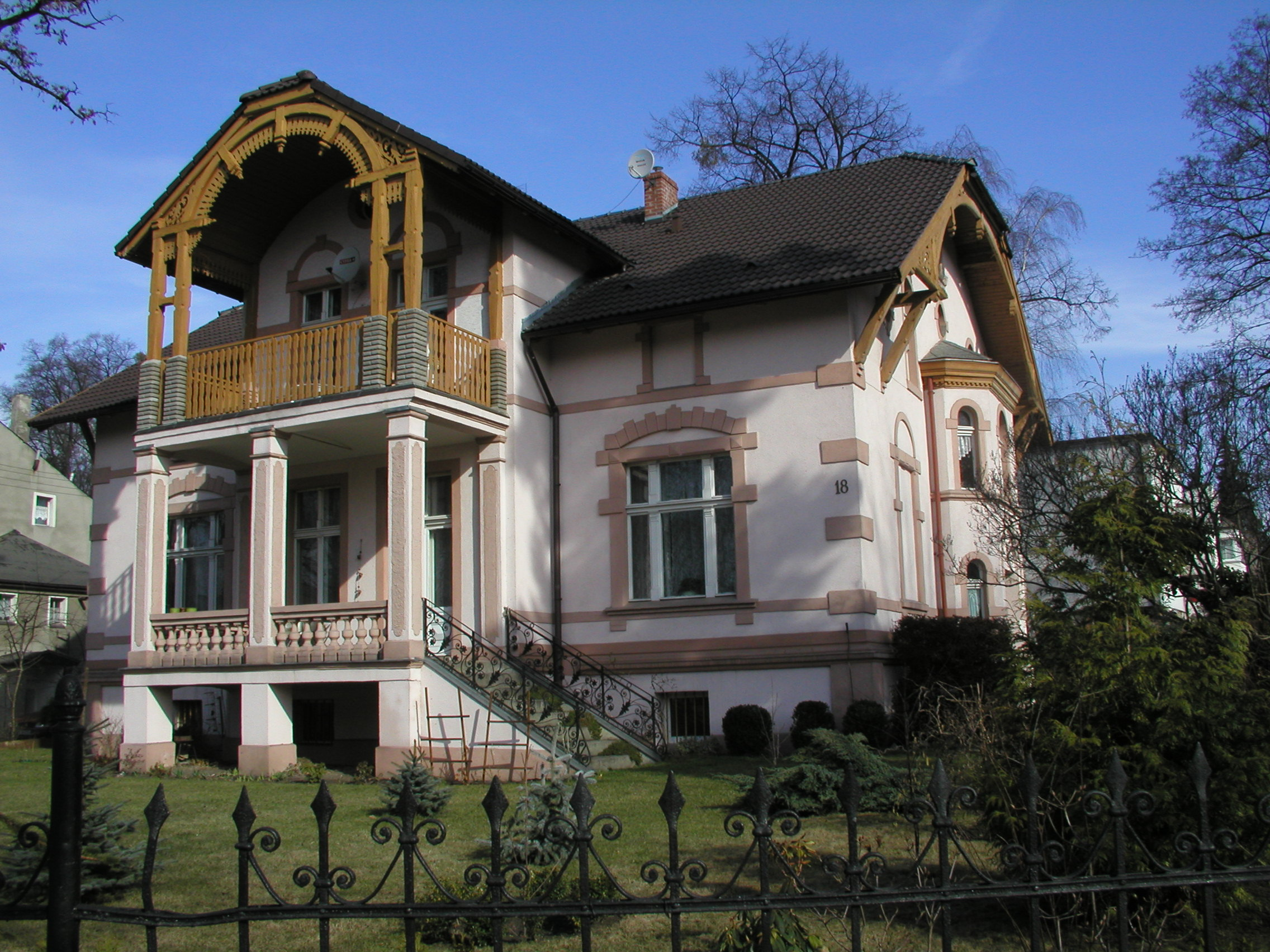 Oborniki Śląskie, budynek przy ul Dworcowej 18